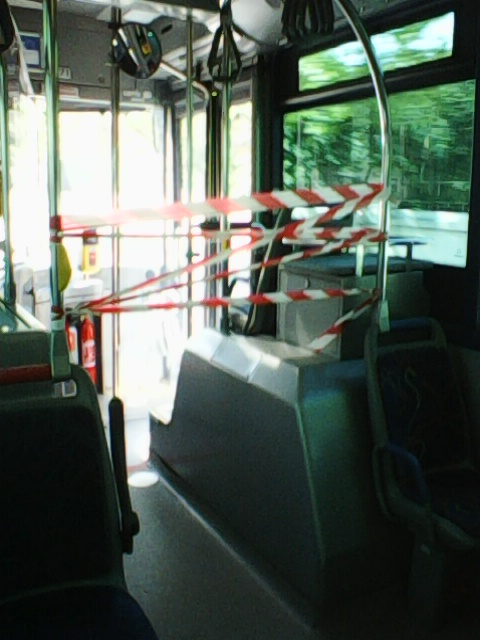 Porta dianteira, habitáculo do motorista, e validadores isolados num autocarro da C.C.F.L. (Lisboa), medidas em vigor durante a fase de mitigação da pandemia de covid-19.